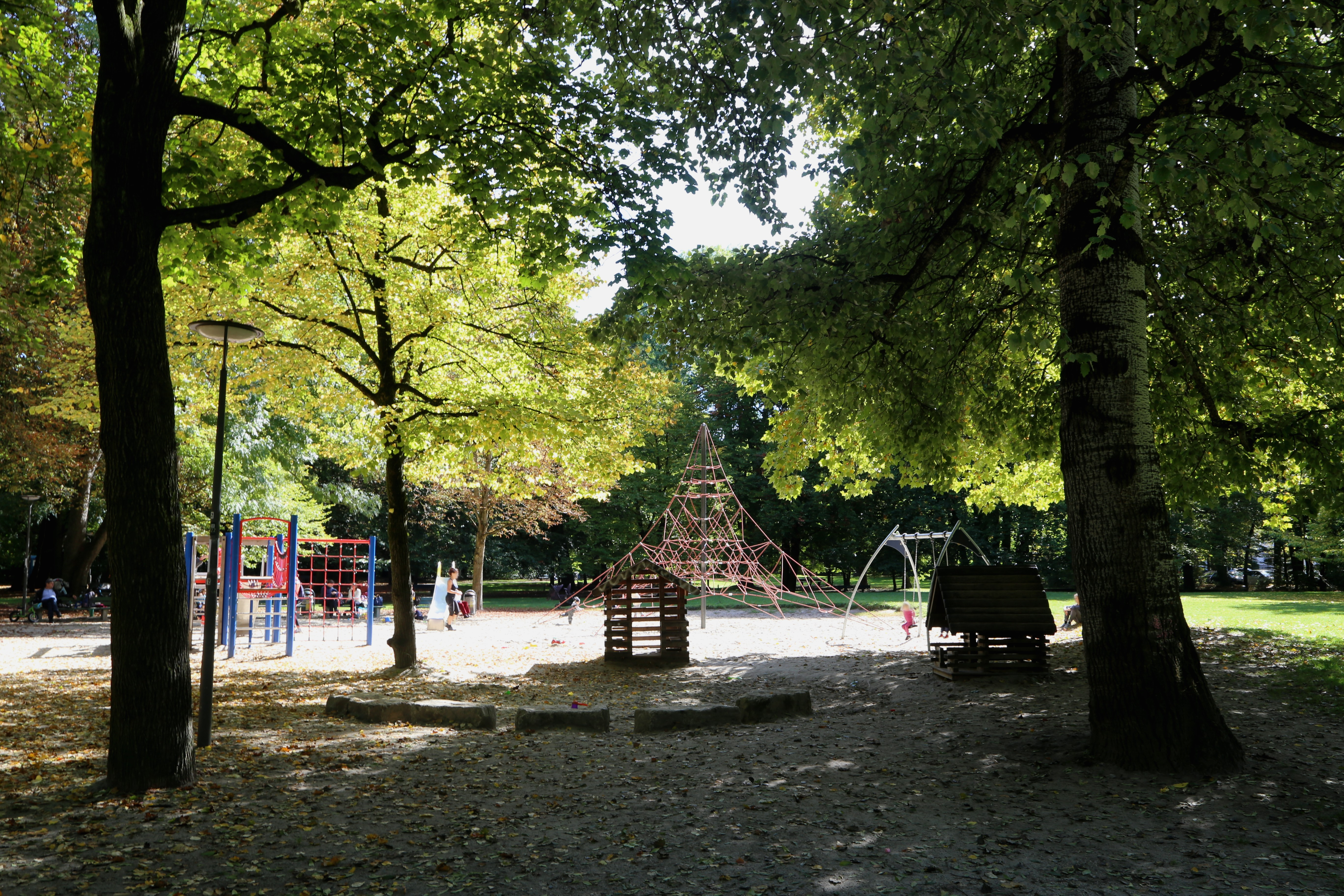 Grünwaldpark, München, liegt im Landschaftsschutzgebiet „Nymphenburg“, LSG 00588.01